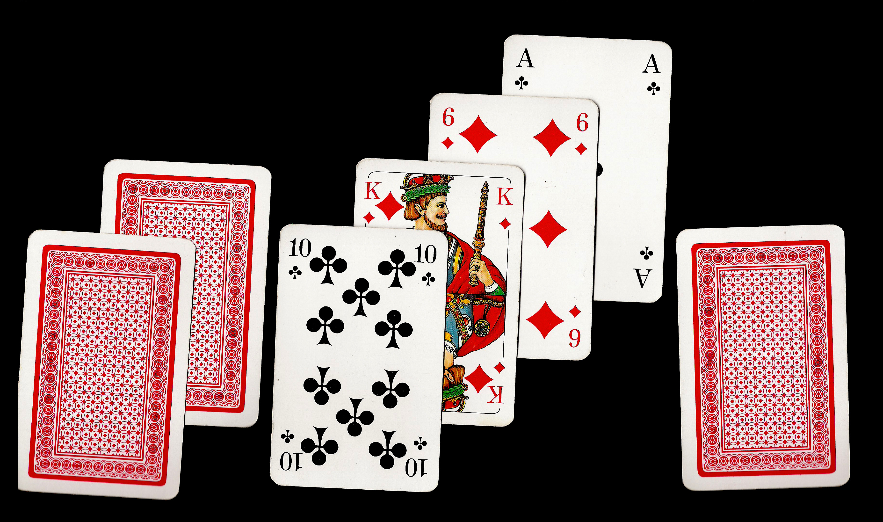 Poker: Hand beim Seven-Card-Stud